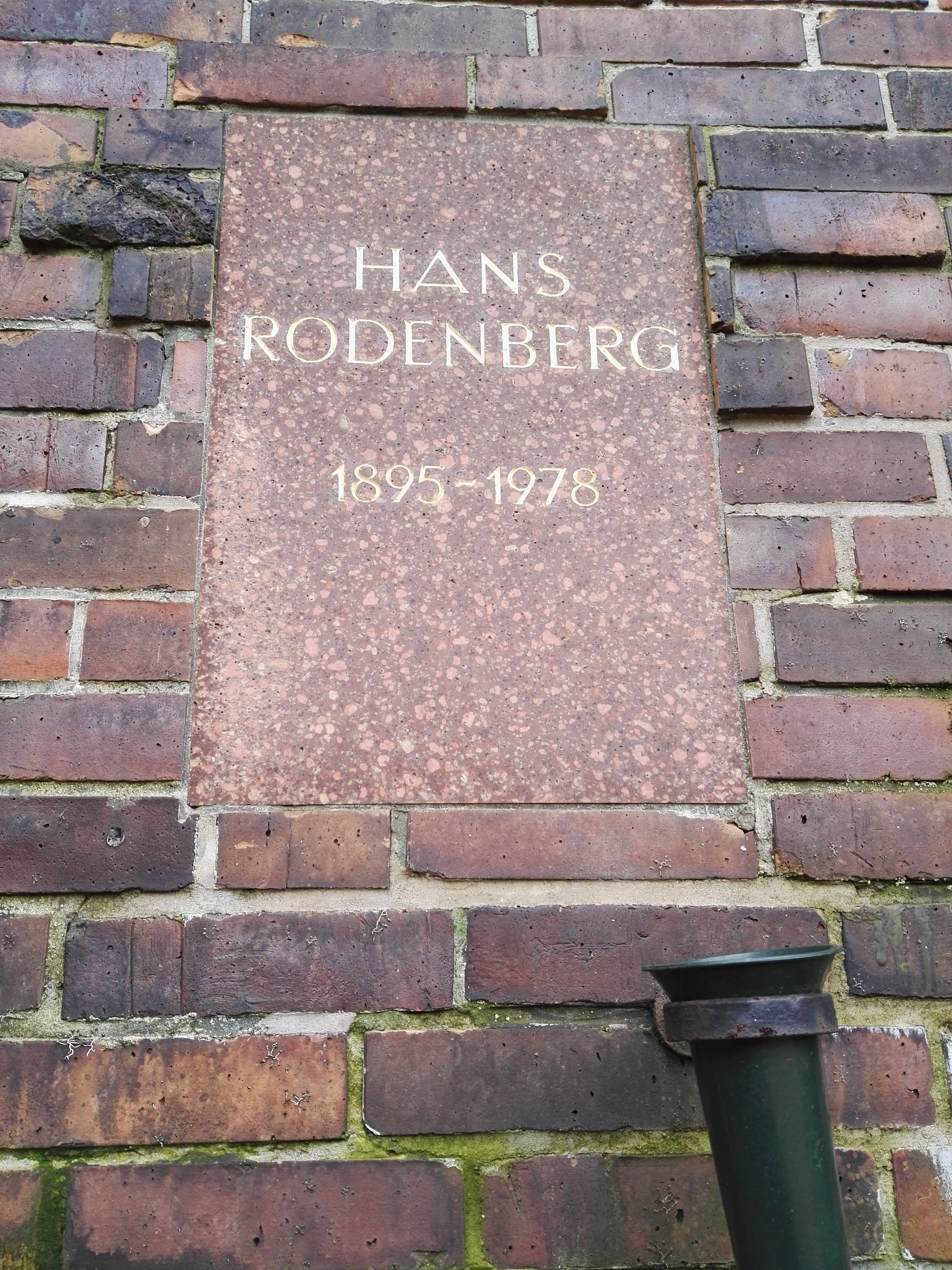 Grab von Hans Rodenberg in der Gedenkstätte der Sozialisten auf dem Zentralfriedhof Friedrichsfelde in Berlin-Lichtenberg